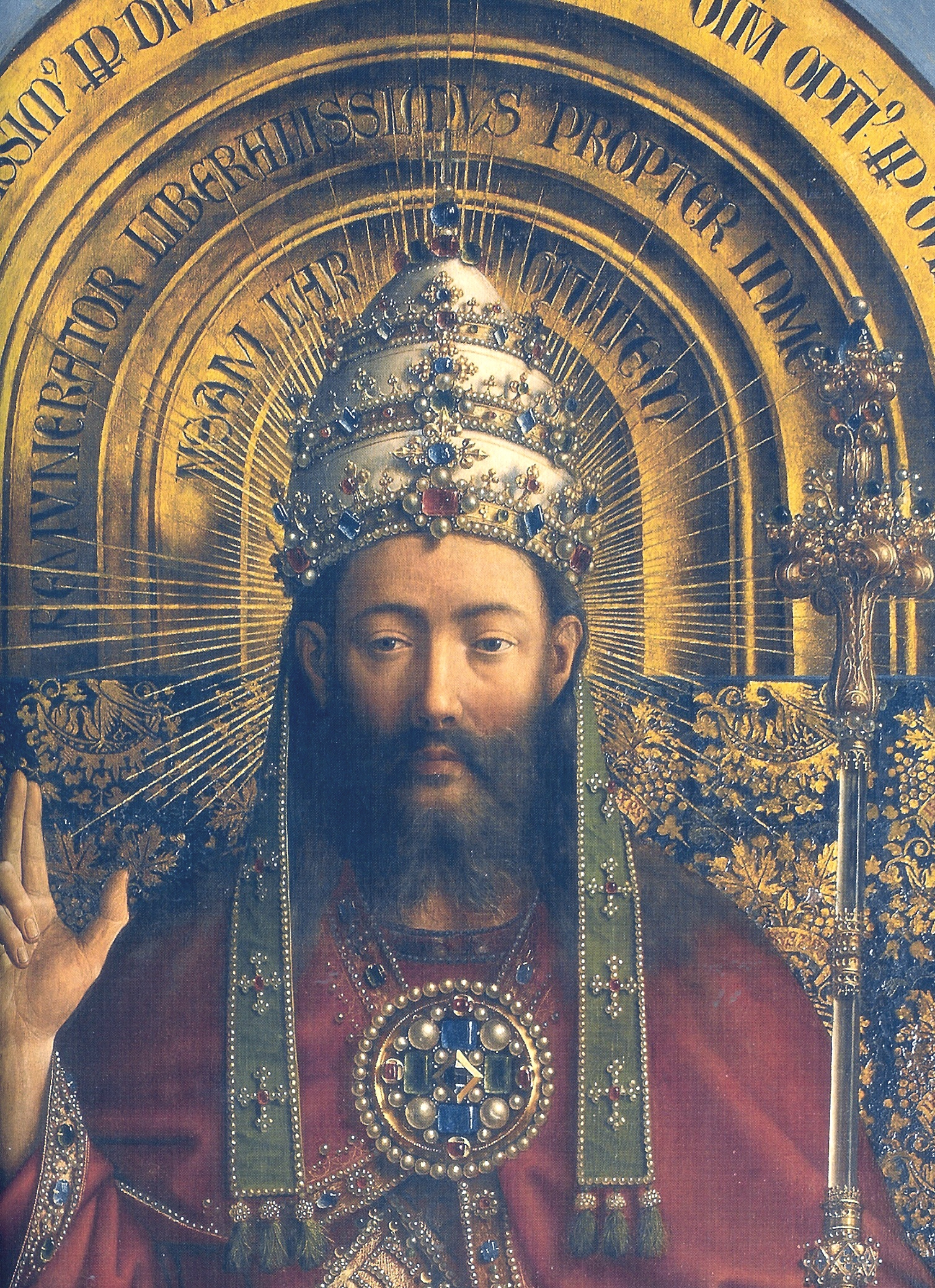 detail: God/Jesus figure